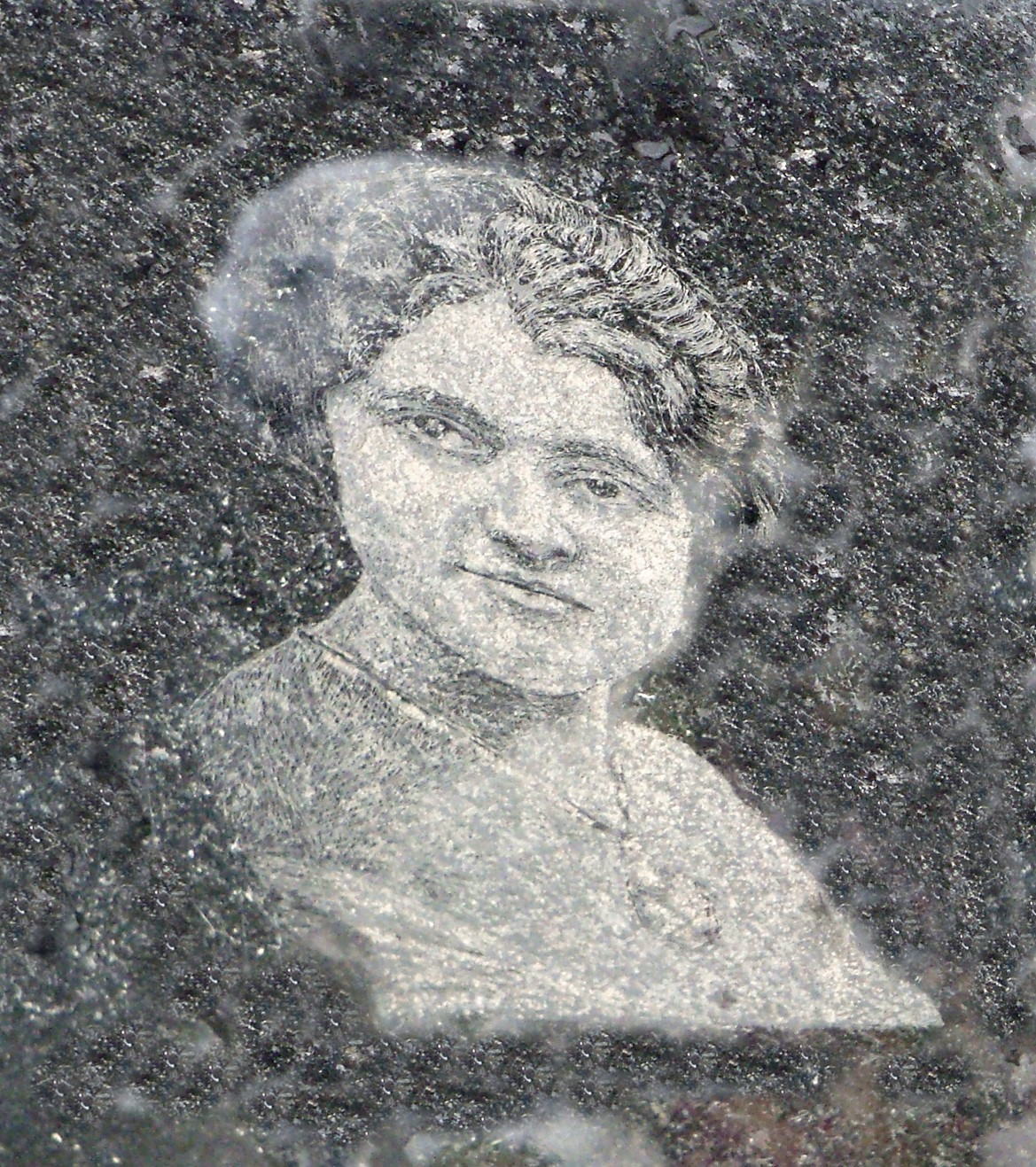 Milena (Emilie) Ivšínová, spisovatelka (189-1976), náhrobní foto